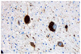 Nachweis von hyperphposphorylierten Tau-Protein in Nervenzellen bei einer Tauopathie, hier (Corticbasale Degeneration).